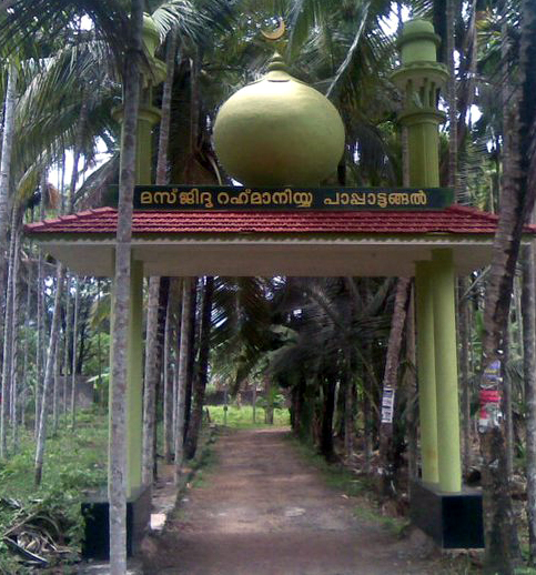 പാപ്പാട്ടുങ്ങൽ ജുമാമസ്ജിദ് ഗേറ്റ്